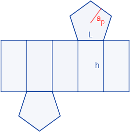 El prisma pentagonal recto está compuesto por 5 caras laterales rectangulares y 2 caras pentagonales (bases).